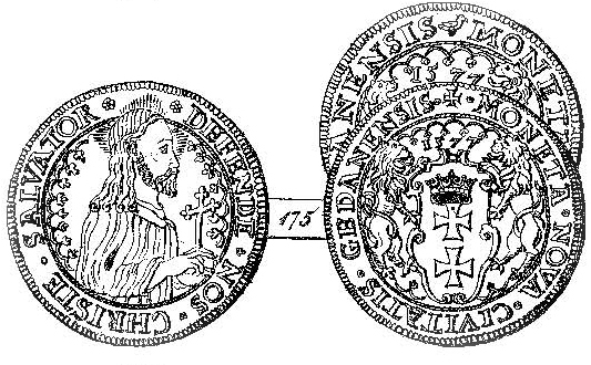 Talar gdański oblężniczy 1577r odmiana